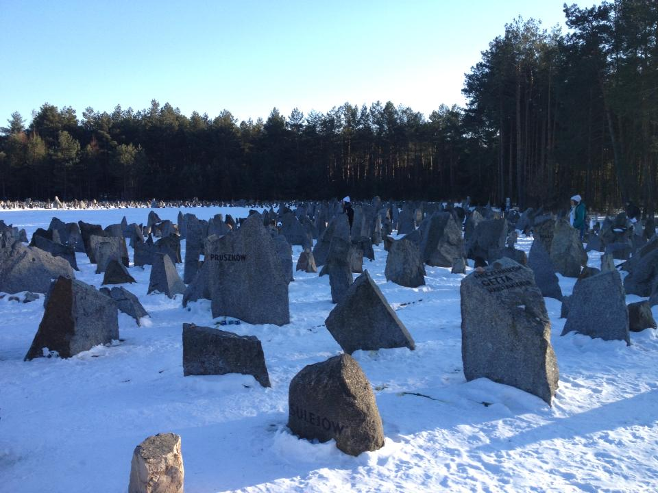 Камни памяти в Треблинке зима 2013